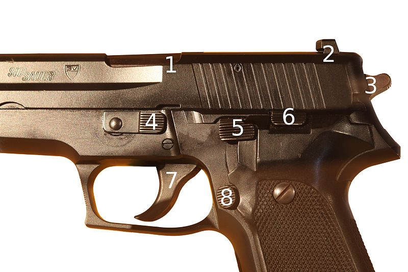 1. Padruni väljumise ava. 2. Tagumine sihik 3. Kukk 4. Lahtivõtmise hoob 5. Kuke blokk mehhanism 6. Kelgufiksaator 7. Päästik 8. Salveriiv